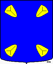 Gemeentewapen Hilversum